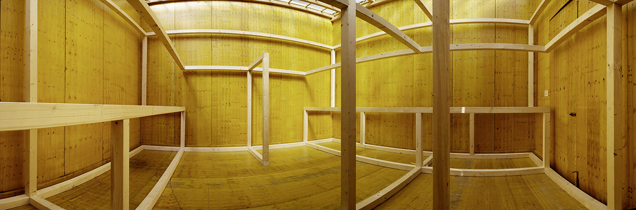 Vom Fotografen frei gegebene Abbildung einer skulpturalen Installation von Ursula Hirsch (Zustimmung des Fotografen schriftlich vorhanden)